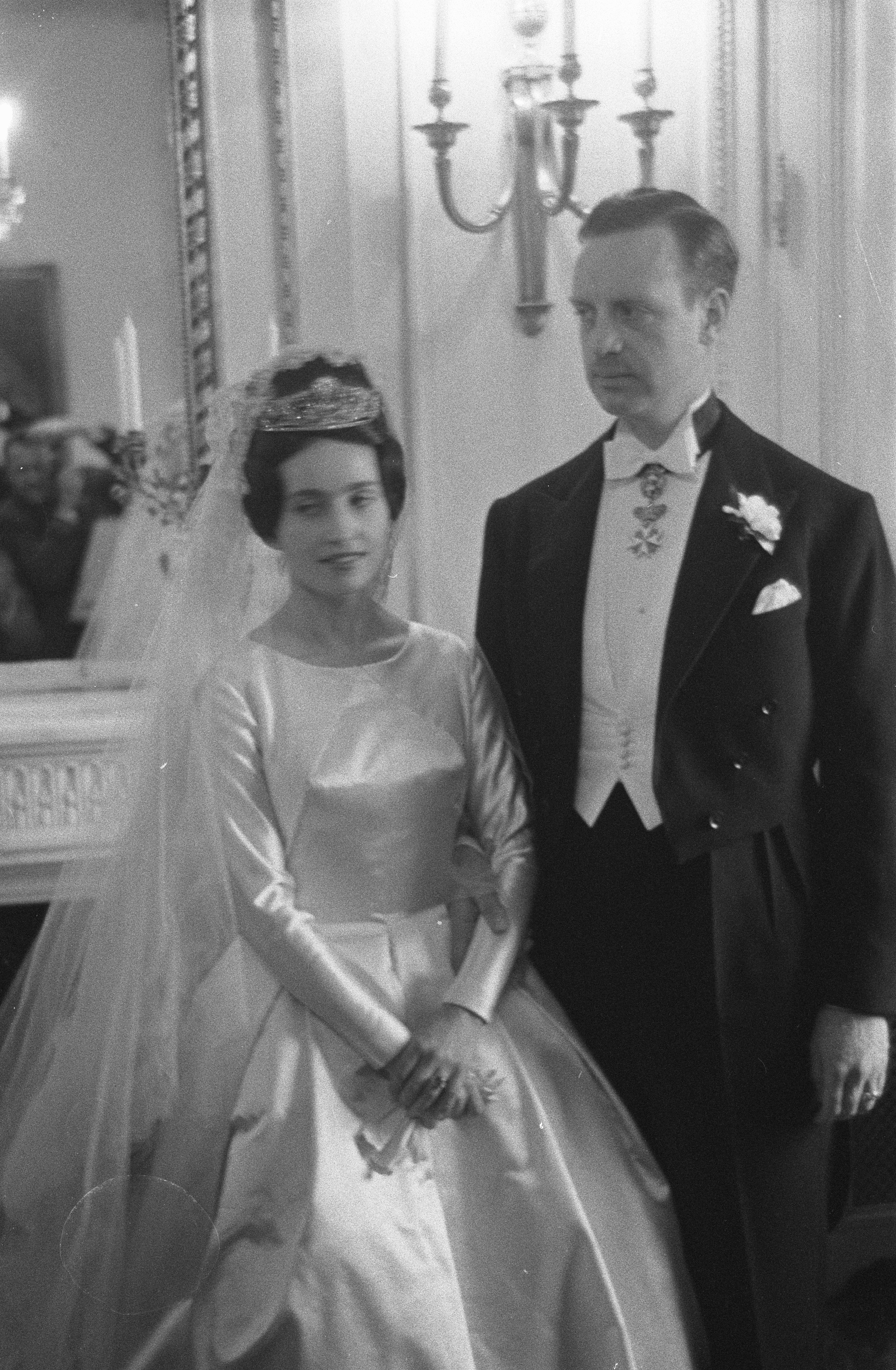 Collectie / Archief : Fotocollectie Anefo Reportage / Serie : [ onbekend ] Beschrijving : Huwelijk van Prinses Francoise van Bourbon Parma met Prins Eduard van Lobkowicz in Parijs Datum : 7 januari 1960 Locatie : Frankrijk, Parijs Trefwoorden : huwelijken Persoonsnaam : Prins Eduard van Lobkowicz Fotograaf : Pot, Harry / Anefo Auteursrechthebbende : Nationaal Archief Materiaalsoort : Negatief (zwart/wit) Nummer archiefinventaris : bekijk toegang 2.24.01.05 Bestanddeelnummer : 910-9247